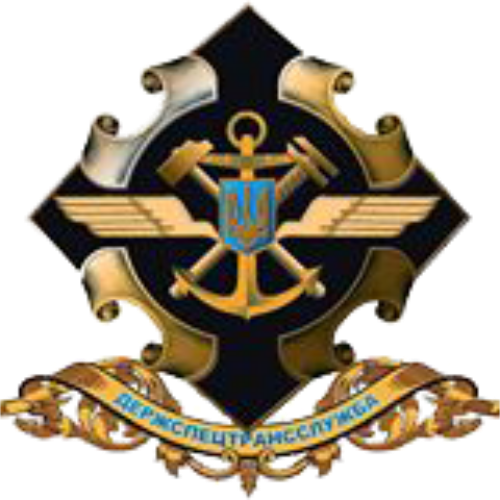 Емблема Державної спеціальної служби транспорту України